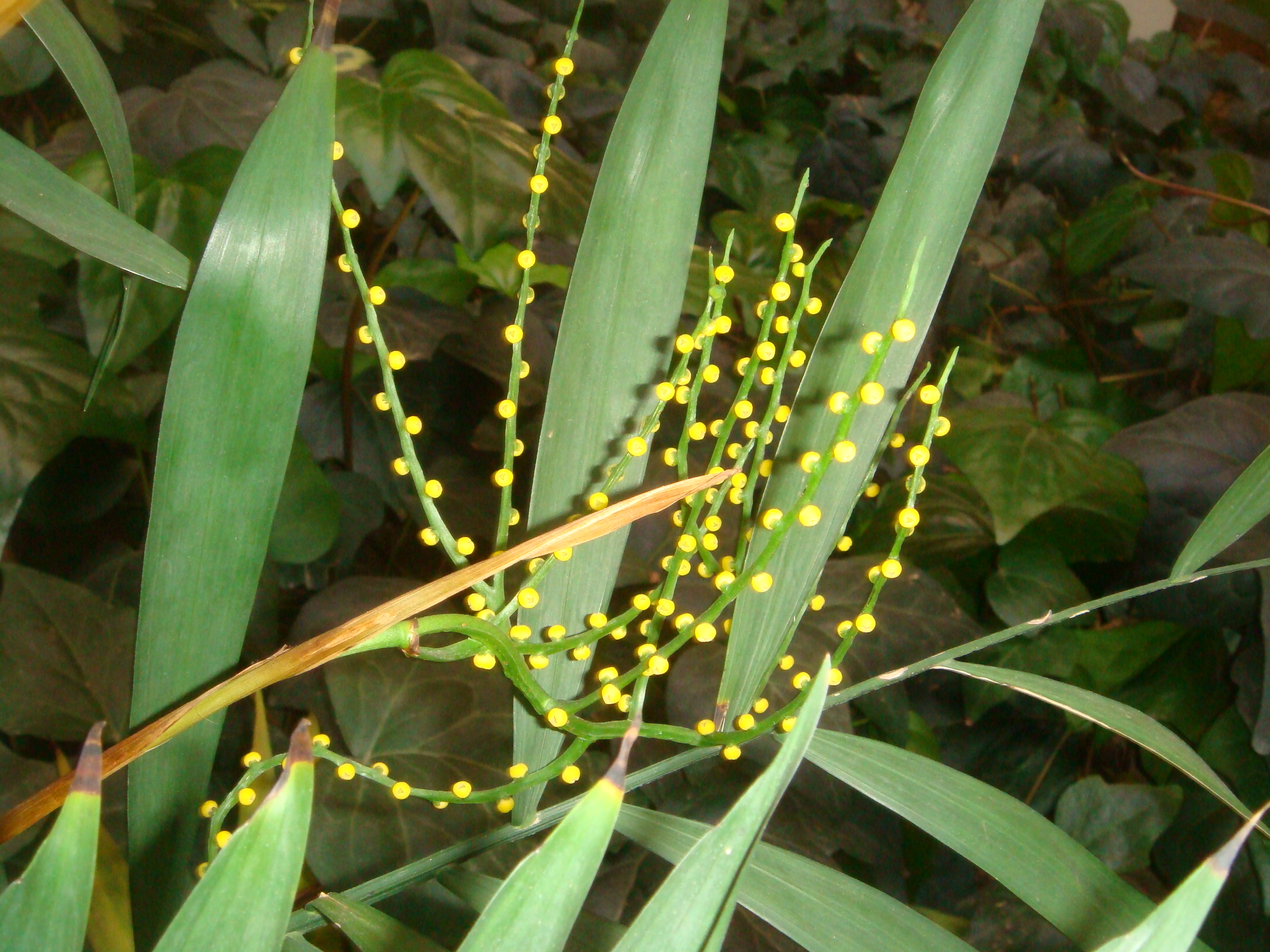 Chamaedorea elegans, cultivated, Arizona State University, Tempe, Arizona (Social Sciences atrium)